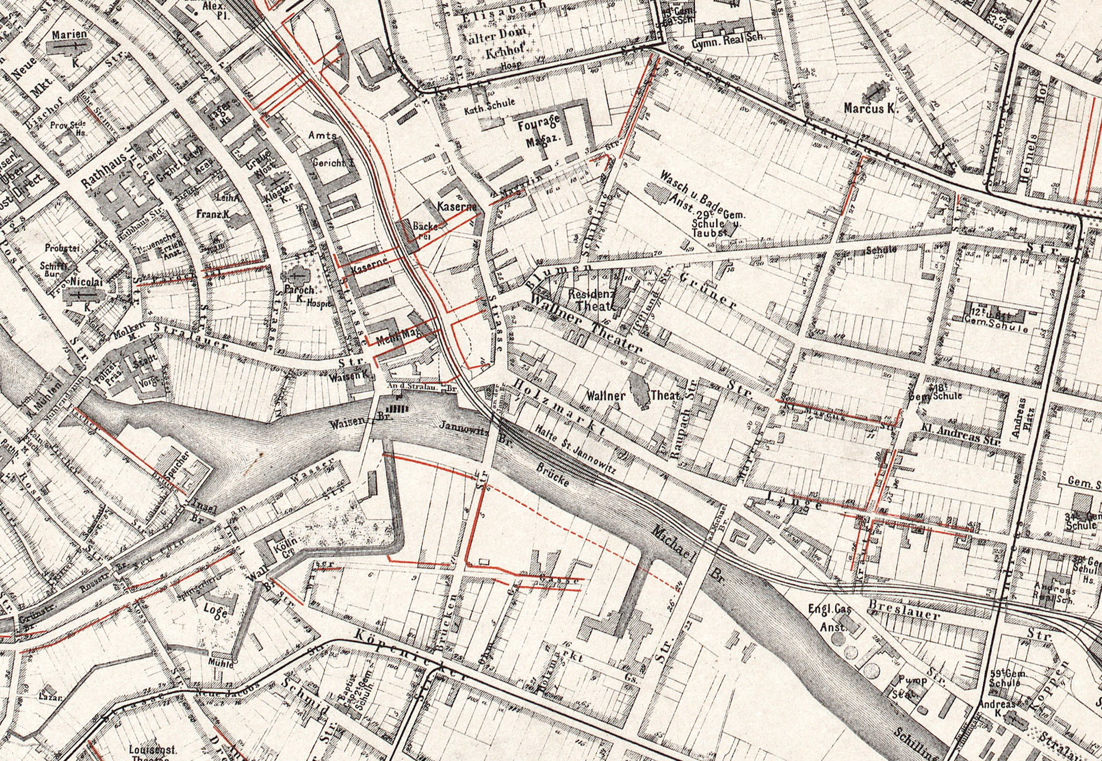 Unter dem Plan steht: "Vervollständigt durch die Städtische Plankammer im Juli 1882". In Rot sind die Planungen nach dem Hobrecht-Plan eingetragen. Die erste Ausgabe dieser Planserie erschien 1866.